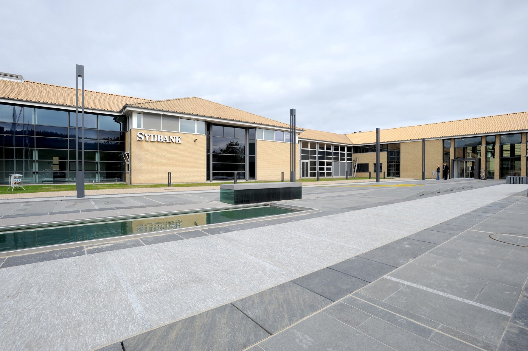 Sydbank A/S hovedkontor